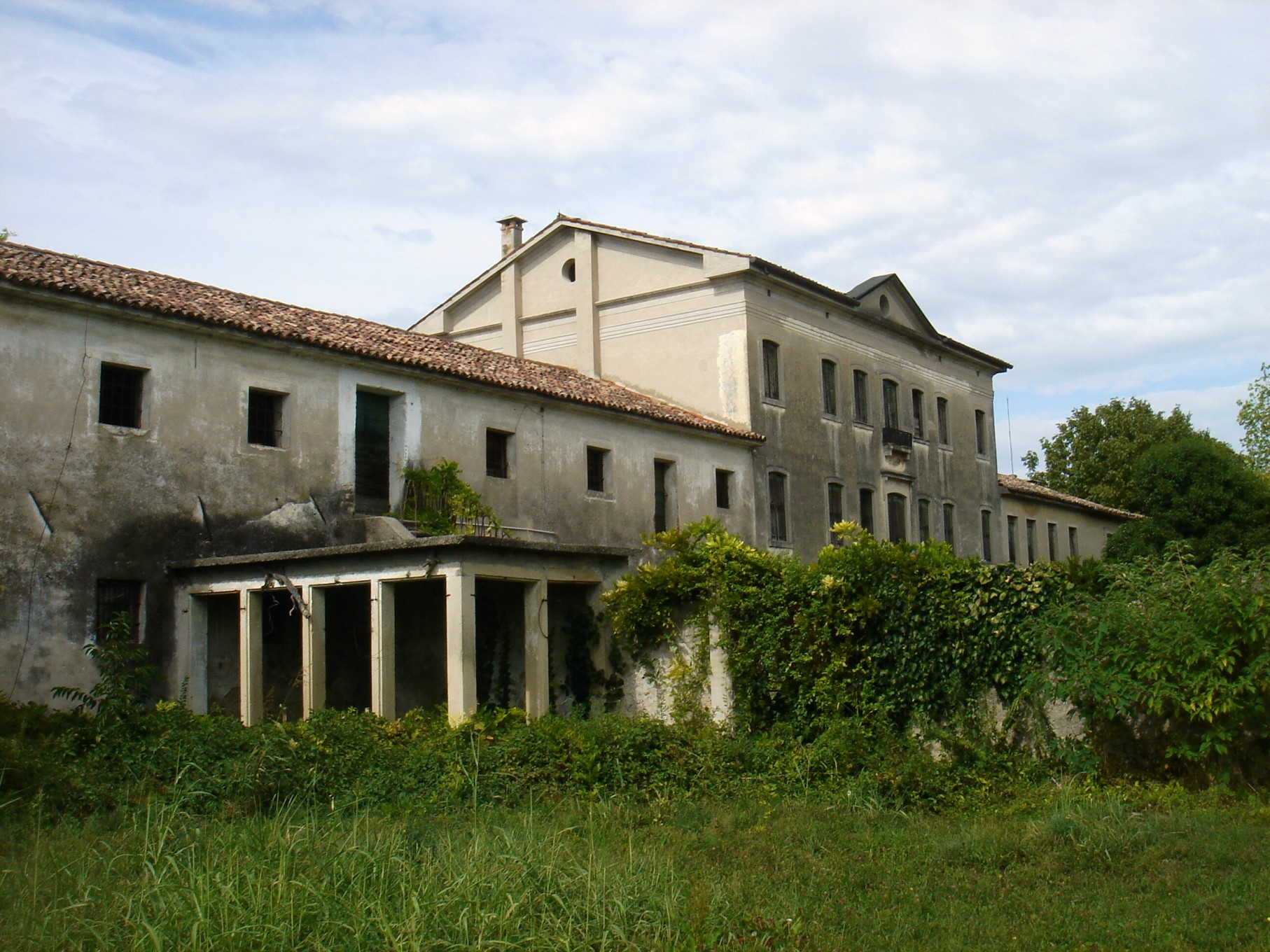 Zoppè di San Vendemiano (Treviso): Villa Vettori (XIX secolo), in cattivo stato di conservazione.